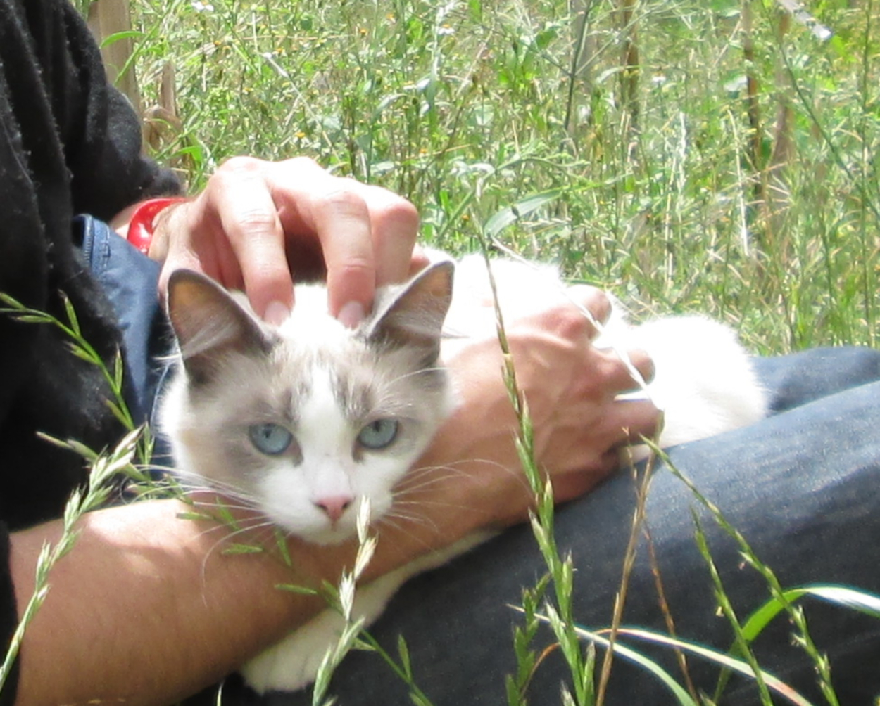 Una caricia a un gato, en medio de la naturaleza This photo has been taken in the country: Colombia